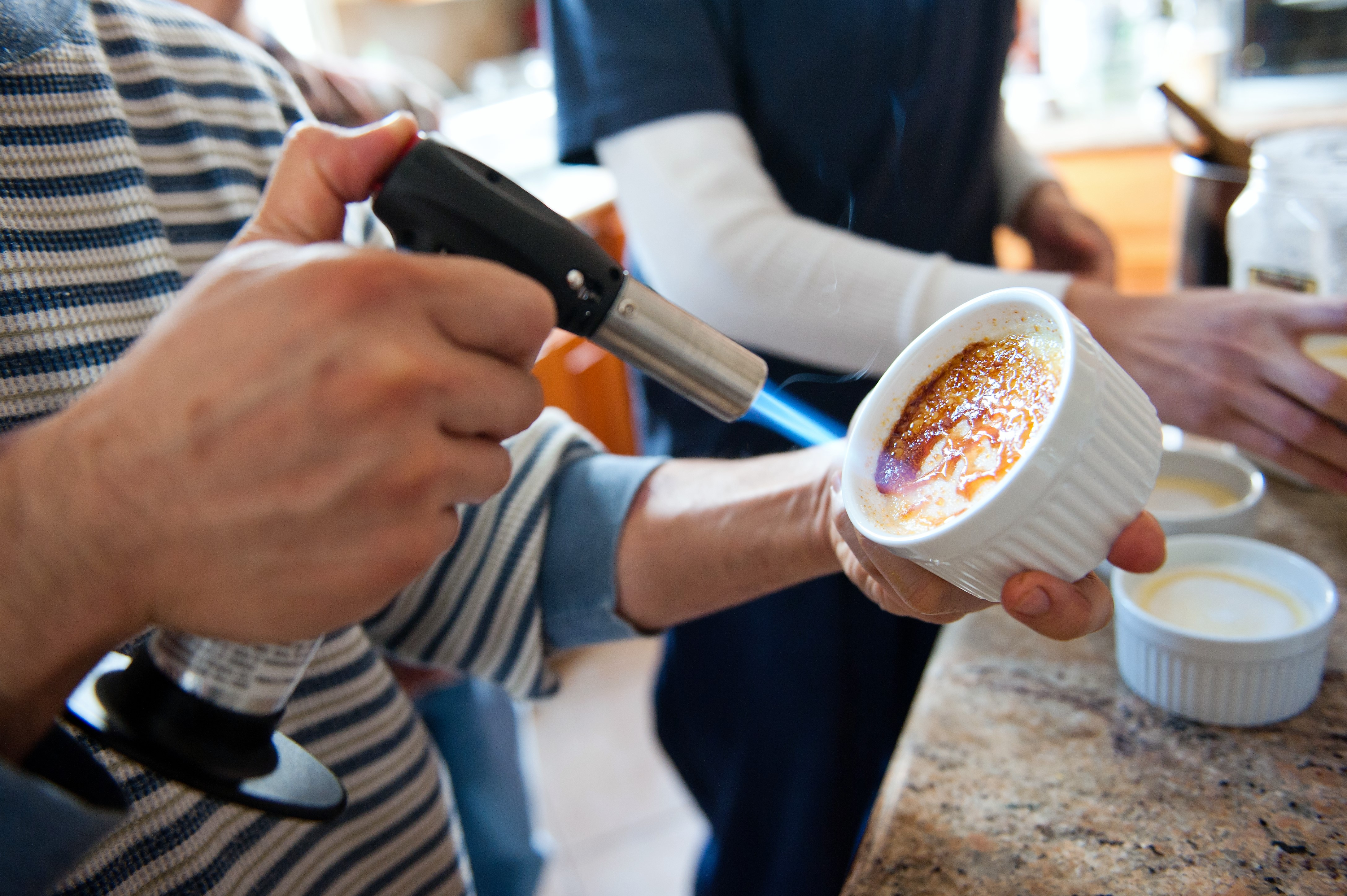 Zubereitung von Crème brûlée: Karamellisieren der Zuckerschicht (auf der gestockten und abgekühlten Ei-Zucker-Creme in einer kleinen Auflaufform) mit einem kleinen Handgasbrenner.